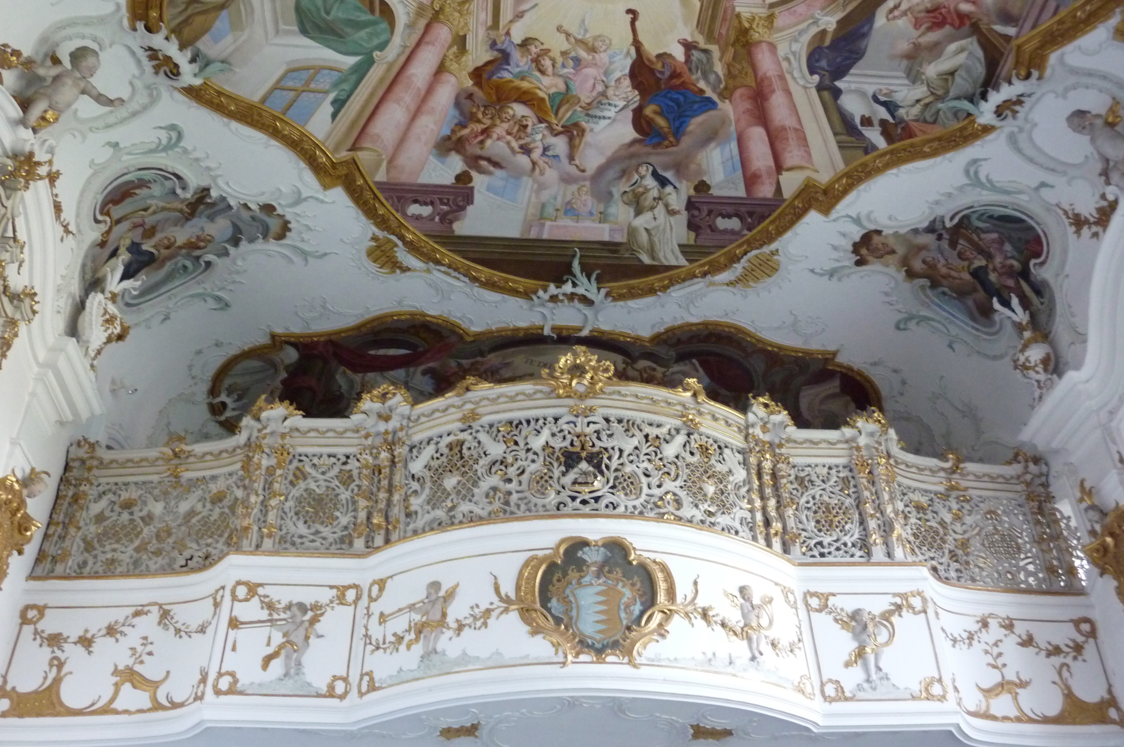 Klosterkirche Maria Medingen (Mariä Himmelfahrt) in Mödingen (Landkreis Dillingen an der Donau) des ehemaligen Dominikanerinnenklosters (heute Provinz Maria Medingen der Dillinger Franziskanerinnen), Empore der Ebnerkapelle